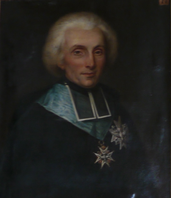 Portrait de l'abbé François-Xavier-Marc-Antoine de Montesquiou-Fézensac (1757-1832), membre de l'Académie française